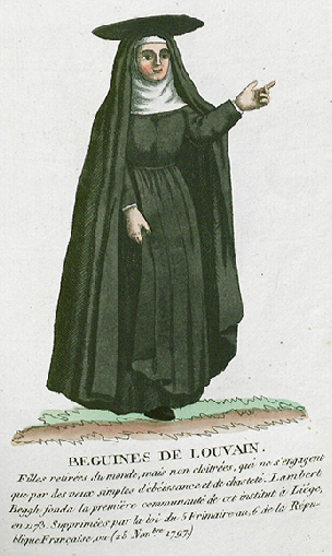 Collection de costumes de tous les ordres monastiques, supprimés à differentes époques, dans la ci-devant Belgique, Bruxelles, Philippe Joseph Maillart et sœur, 1811